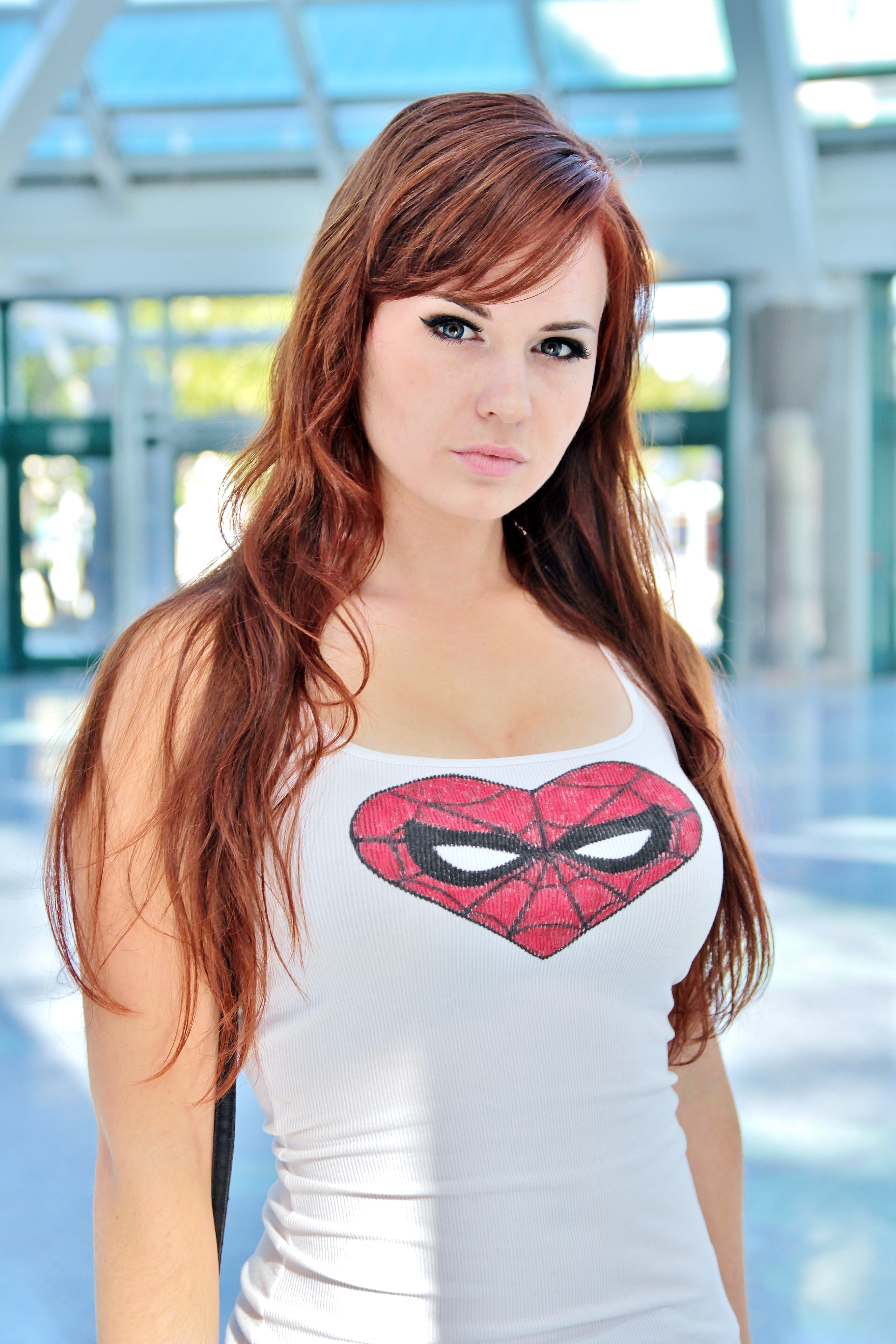 Cosplay at Comikaze Expo 2015.